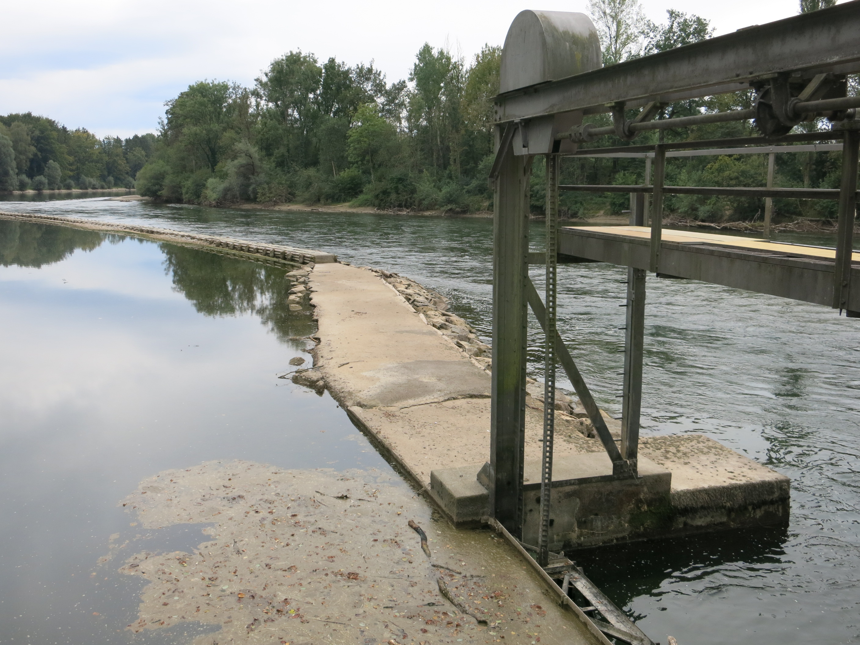 Historisches Kleinkraftwerk Ottenbach ZH, Schweiz